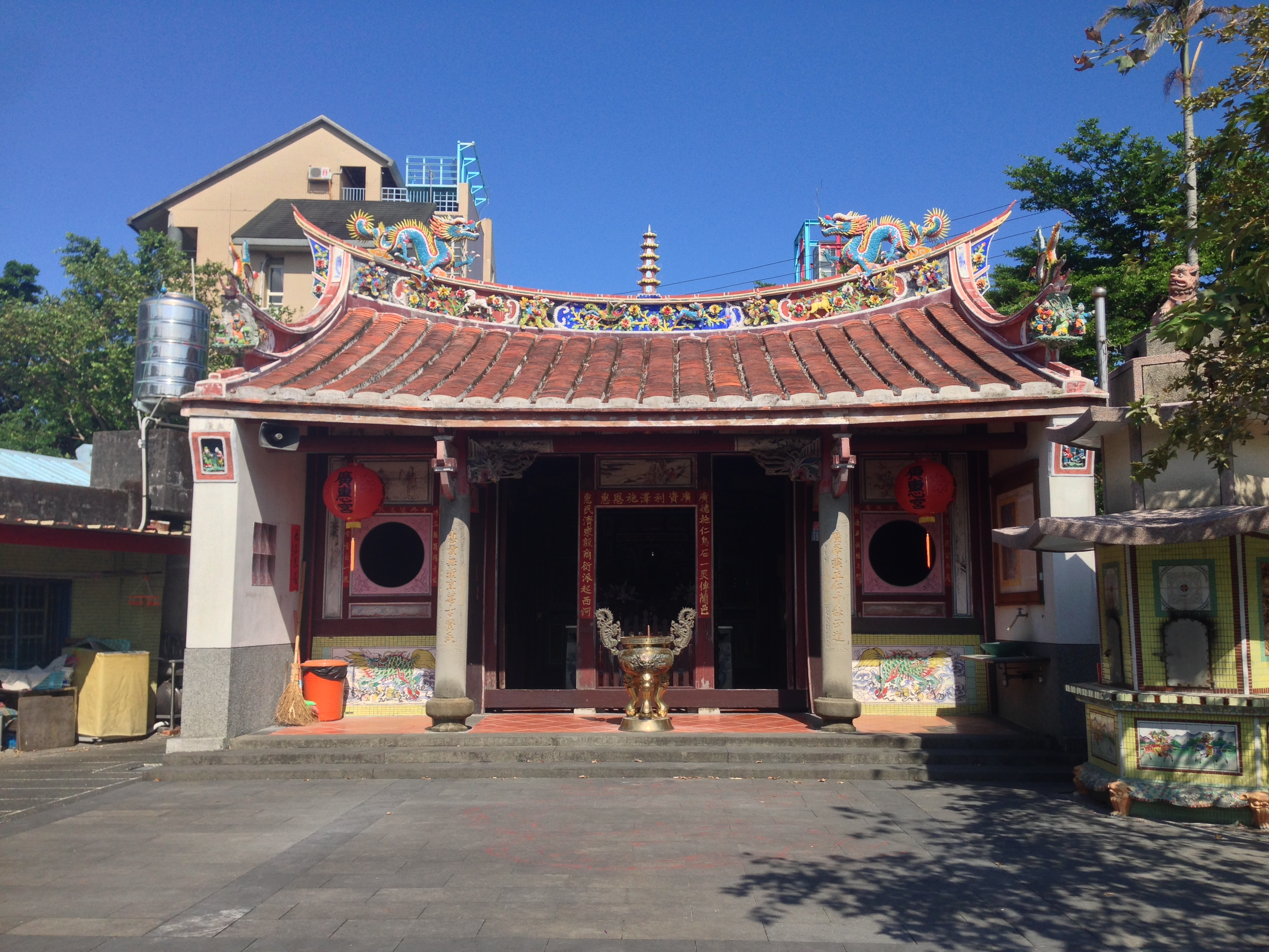 利澤簡廣惠宮正面照